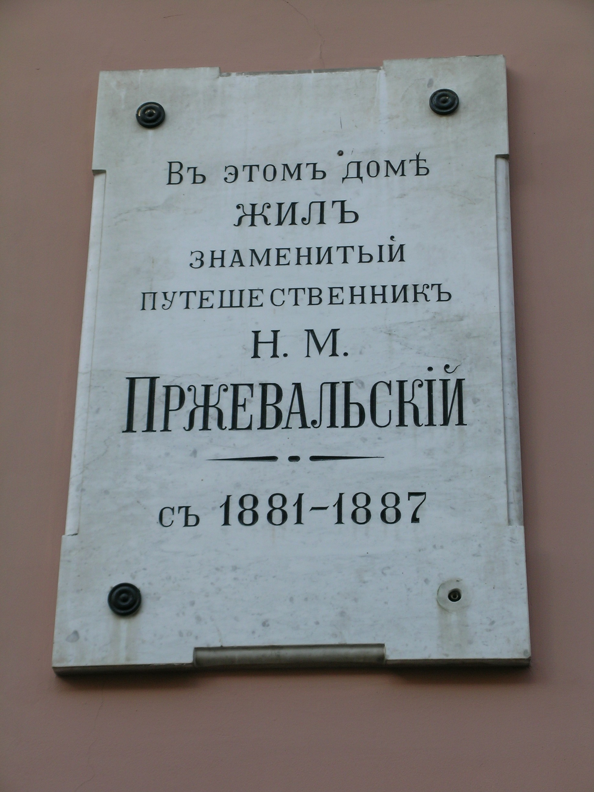 В этом доме жил знаменитый путешественник Н. М. Пржевальский в 1881—1887 г.г. (перевод на современный язык)